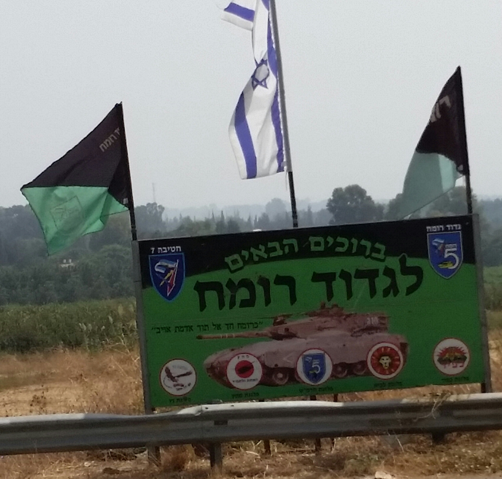 שלט "ברוכים הבאים" לגדוד רומח, מעלה גמלא, רמת הגולן